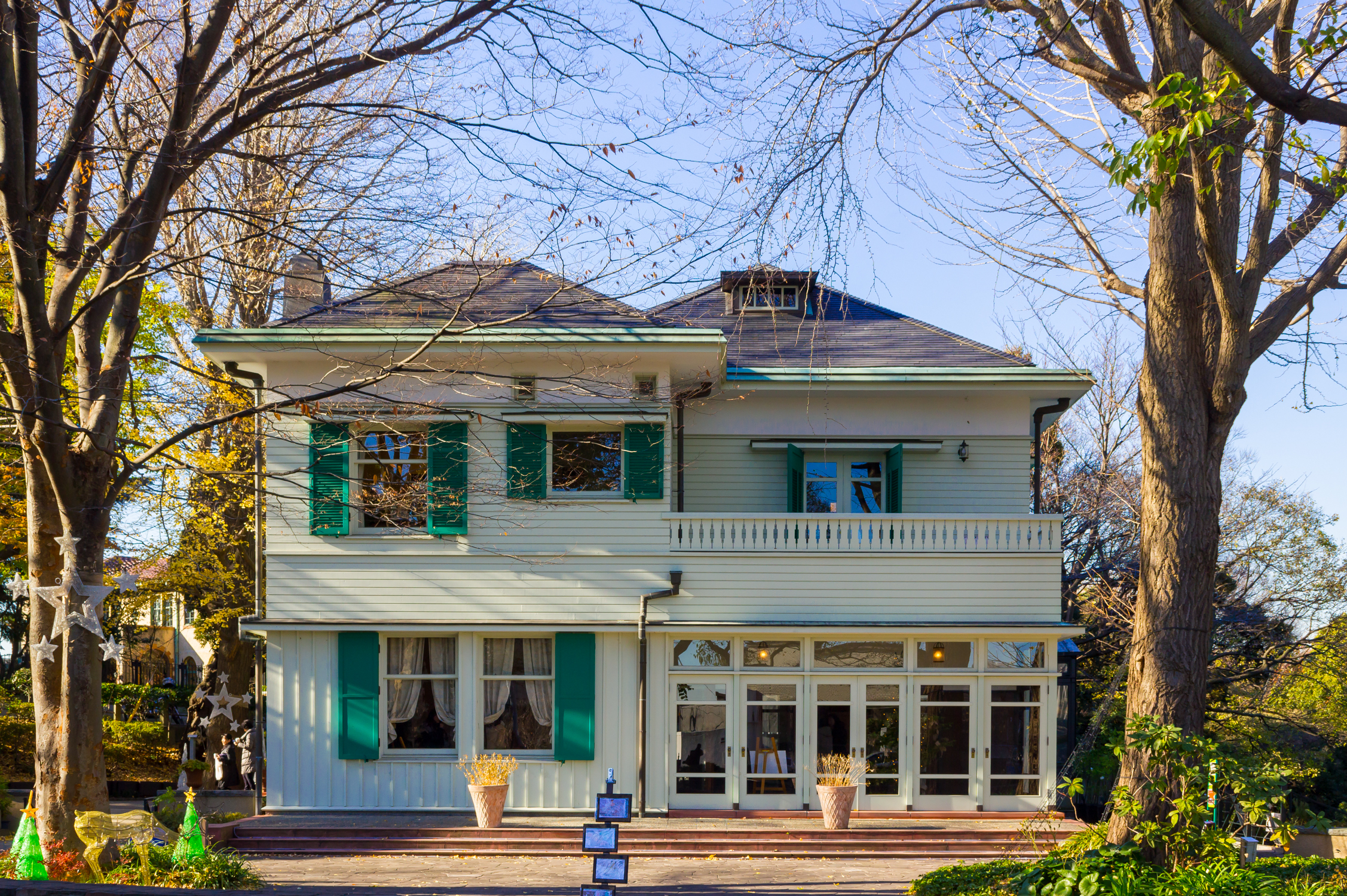 エリスマン邸（横浜市認定歴史的建造物、横浜市中区山手町 ） - アントニン・レーモンド設計